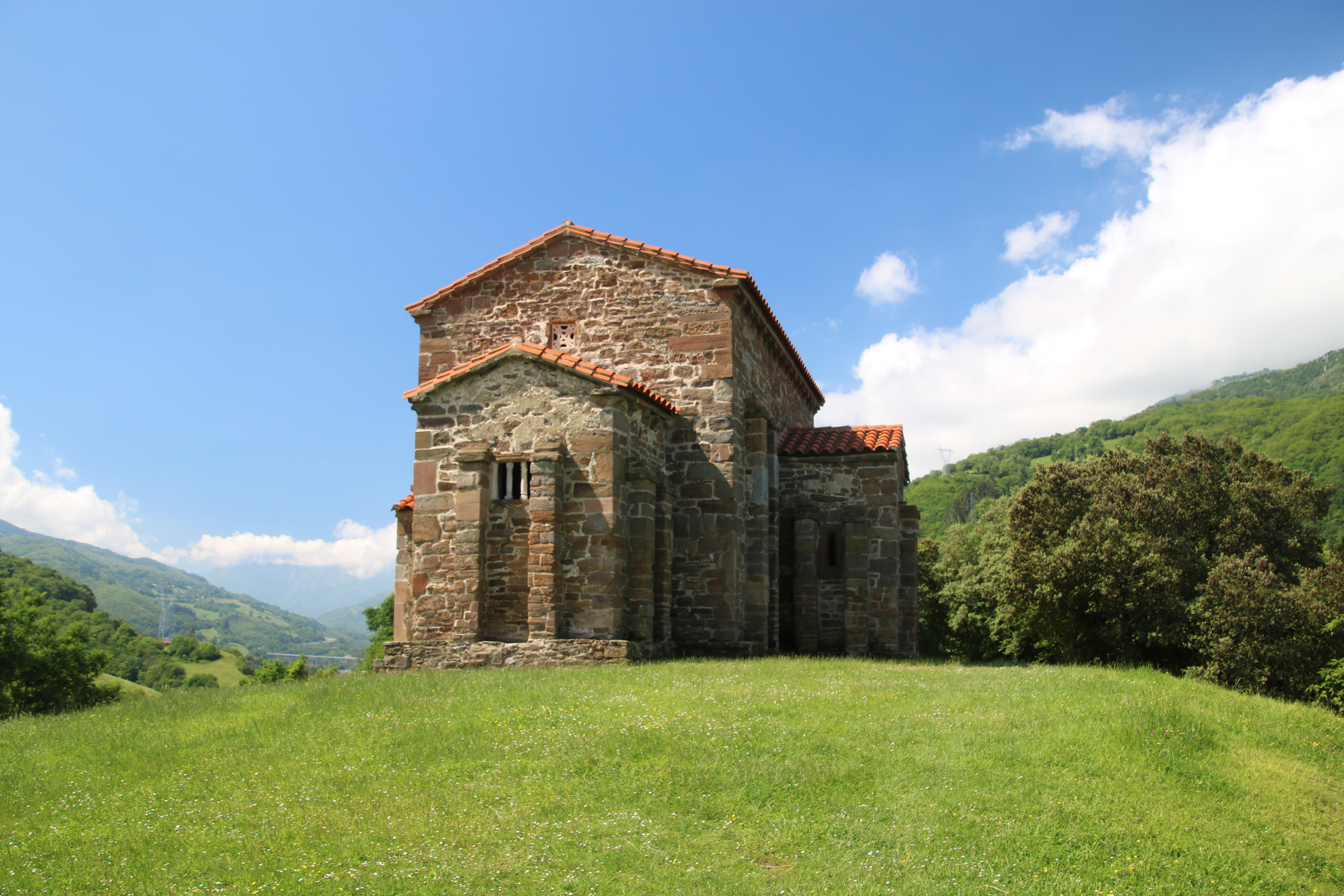 Camino de San Salvador_tappa da Pajares a La Pola de Lena